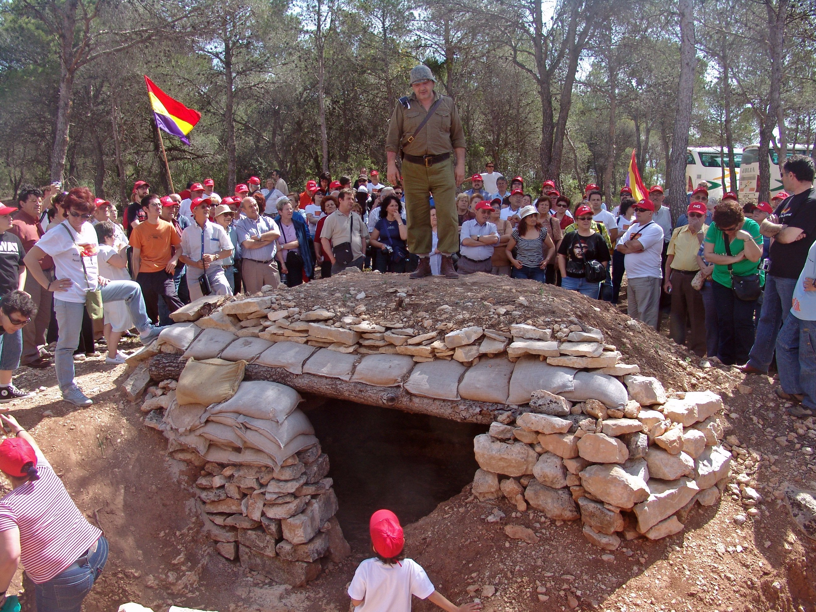 Búnker de la Batalla del Ebro en Corbera d'Ebre. Concentración republicana de EUiA en 2006.